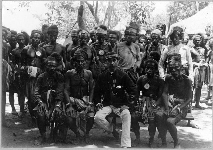 Negatief. Roti is een klein eilandje gelegen ten zuidwesten van Timor. Onder de VOC waren er veel inwoners gekerstend, maar verder zat de Compagnie, die op Timor een vestiging had, lelijk met de eilanders in de maag. Zo klein als het eiland was telde het wel een groot aantal vorstjes die elkaar voortdurend beoorloogden. Daarbij werd niet zelden de hulp van de VOC ingeroepen. In de 19e eeuw trachtte men het probleem soms op te lossen door lastige 'radja's' met hun volgelingen naar Timor te laten emigreren met als gevolg dat uiteindelijk een deel van Timors westkust door Rotinezen werd bewoond. Dat ging ook wel eens mis, zoals uit deze foto blijkt. De tekst bij de foto luidt verder: "Onderhandelingen van de Posthouder van Pariti met de oproerige hoofden". (P. Boomgaard, 2001). Op Timor zijn de posthouder (lokaal ambtenaar) van Pariti, dhr. J. Rozet, en een groep opstandige bestuurdshoofden van Roti bijeen gekomen om te onderhandelen